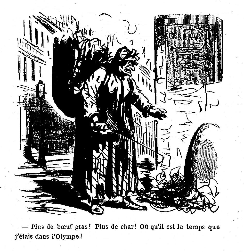 Une ex déesse du cortège du Bœuf Gras de Paris devenue chiffonnière regrette le cortège qui n'est plus sorti depuis 1870.